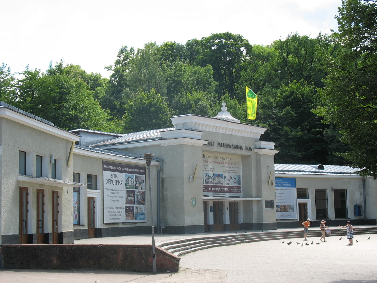 Бювет №1. Трускавець